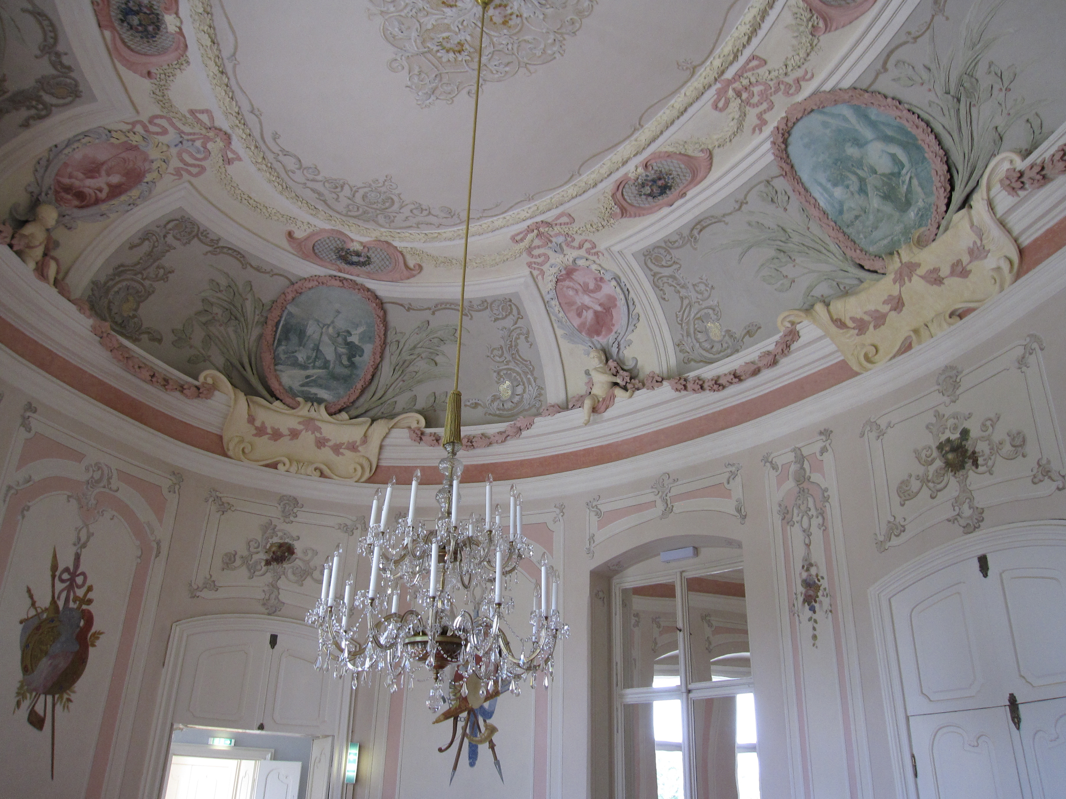 Schloss Neuwaldegg in Wien.